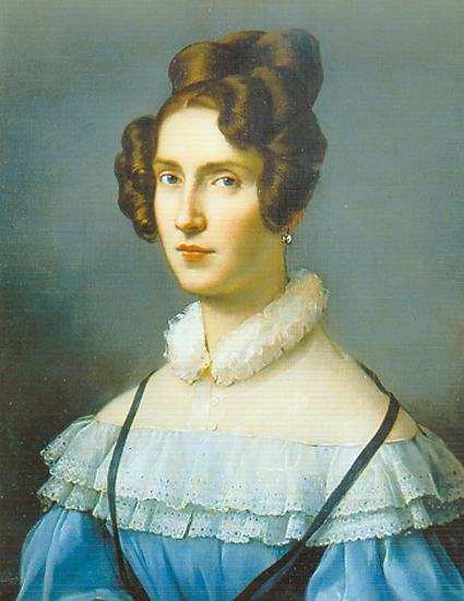 Carlotta Marchionni